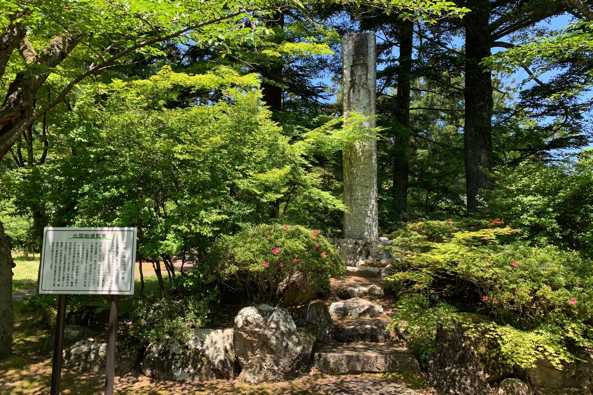 三根山藩址公園にある「三根山藩址之碑」（2020年6月）